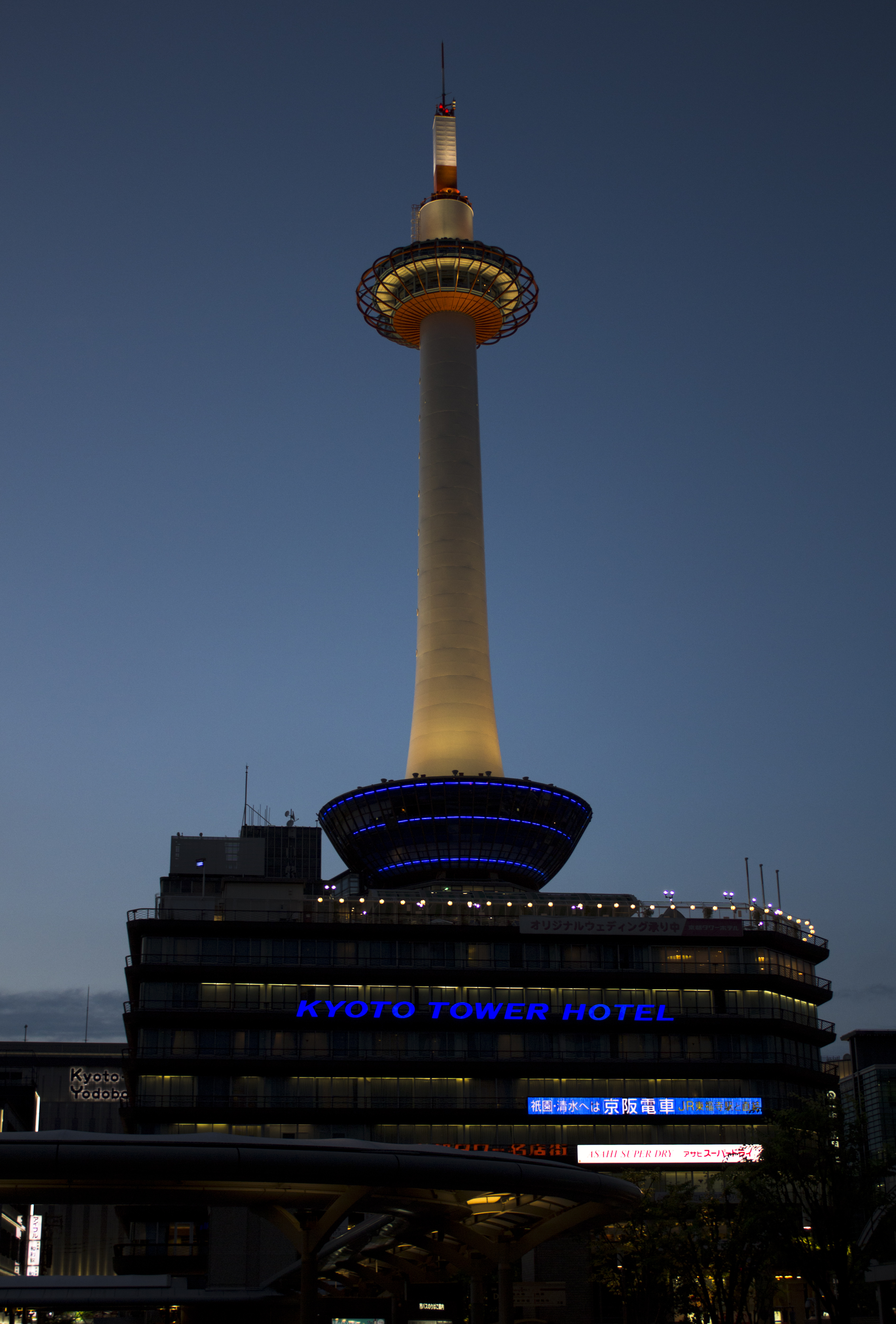 Kyoto Tower